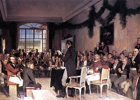 Sujet: Nationalversammlung zu Eidsvoll 1814 Source: User:Leifern Englesch Wikipedia [1]